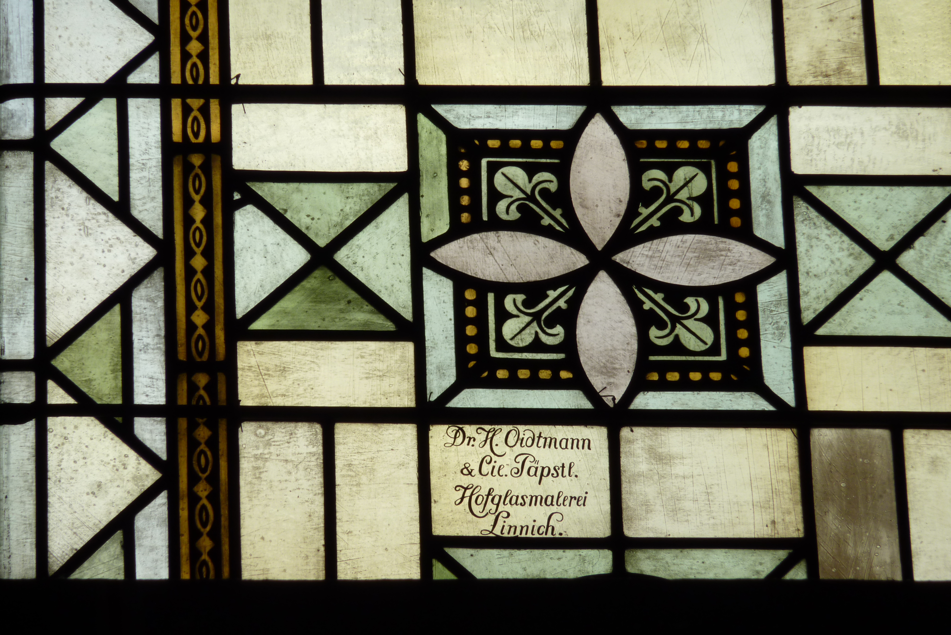 Bleiglasfenster in der katholischen Kirche St. Peter in Westum, Detail mit Signatur: Dr. H. Oidtmann & Cie Päpstl. Hofglasmalerei Linnich